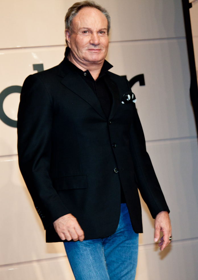 Rocco Barocco